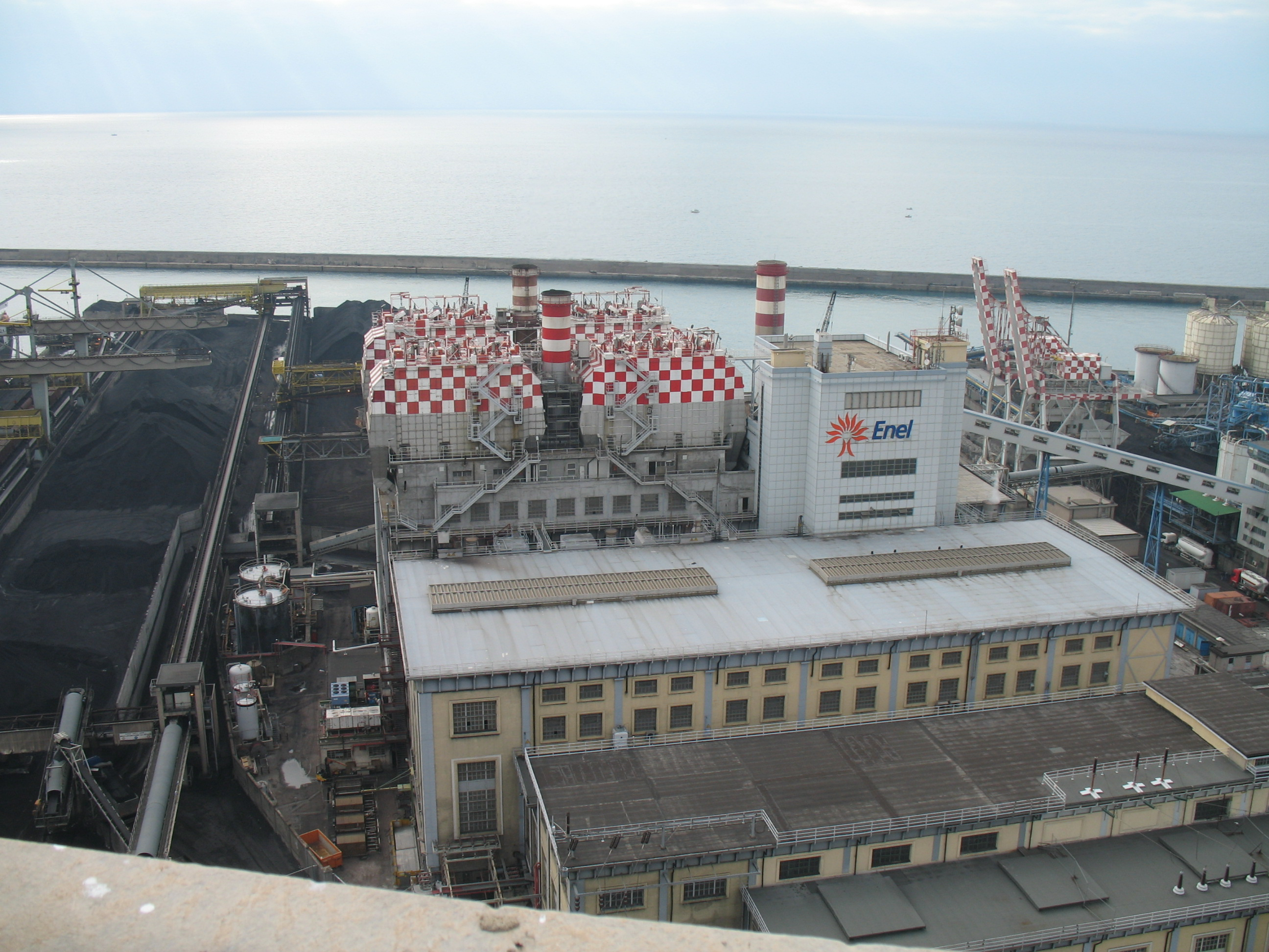 Immagine dal Porto di Genova (terminal, moli, container, calate, ecc.)